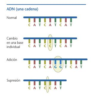 Obtenida de : [1]